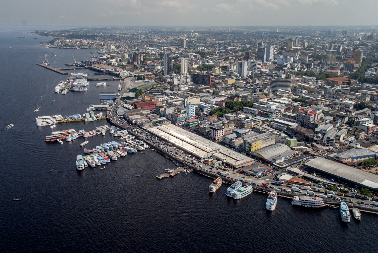 Localizado às margens do rio Negro, o Porto de Manaus foi construído por ingleses e aberto em 1907. Atende vários estados da região Norte e ao mercado mundial.